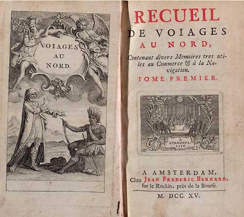 Titelvorsatzblatt der Recueil de voyages au Nord, Amsterdam, 1715-38, Jean Frédéric Bernard